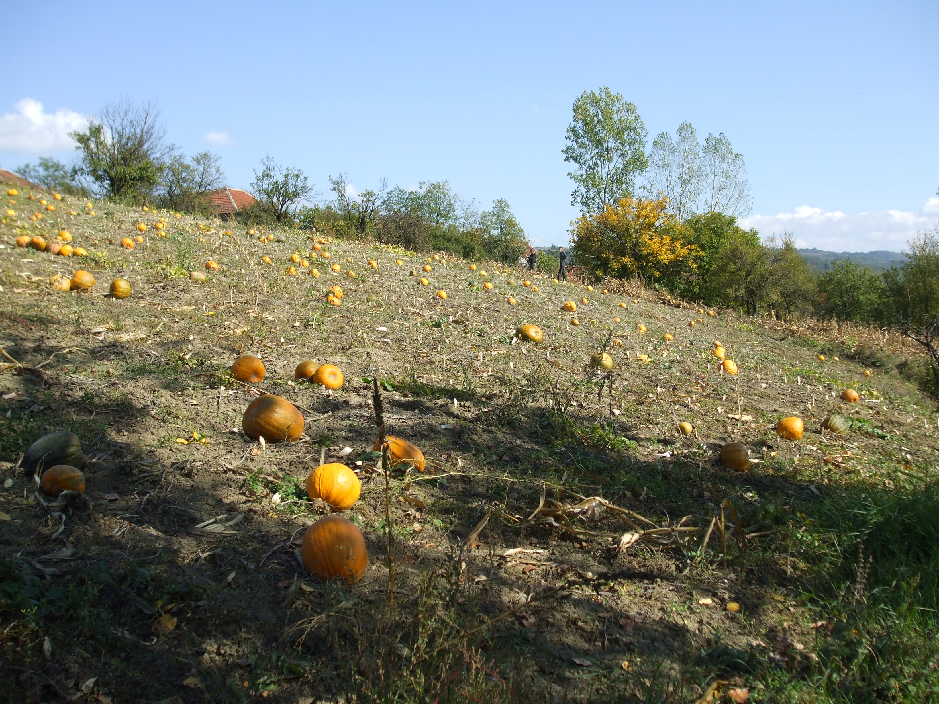 Њива Слађана Ристића из Власа.